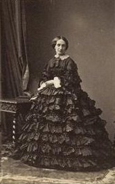 Софья Александровна Кочубей (1825-1875)